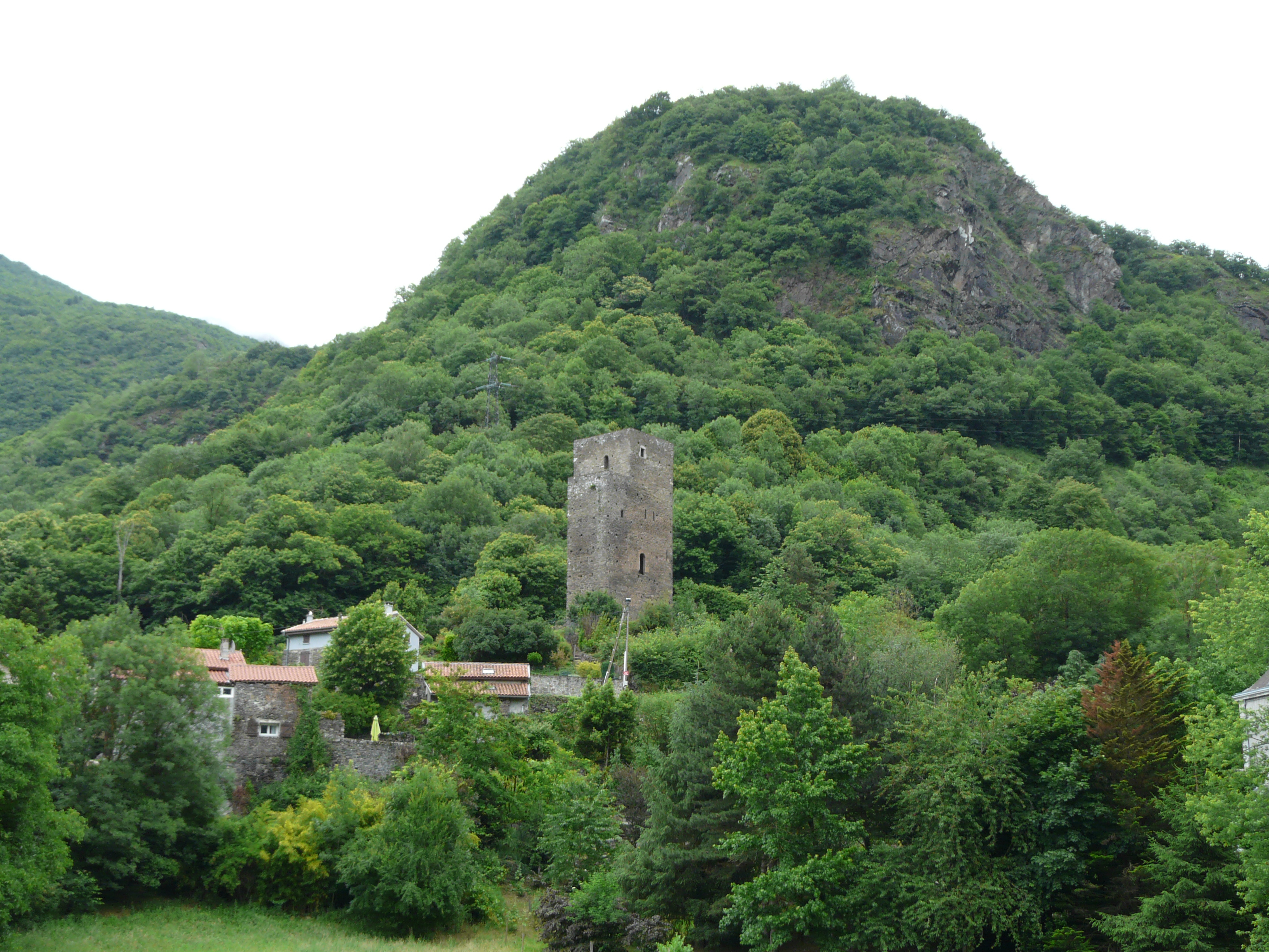 Le village de Fronsac dominé par la tour du château des Comtes de Comminges, Haute-Garonne, France.